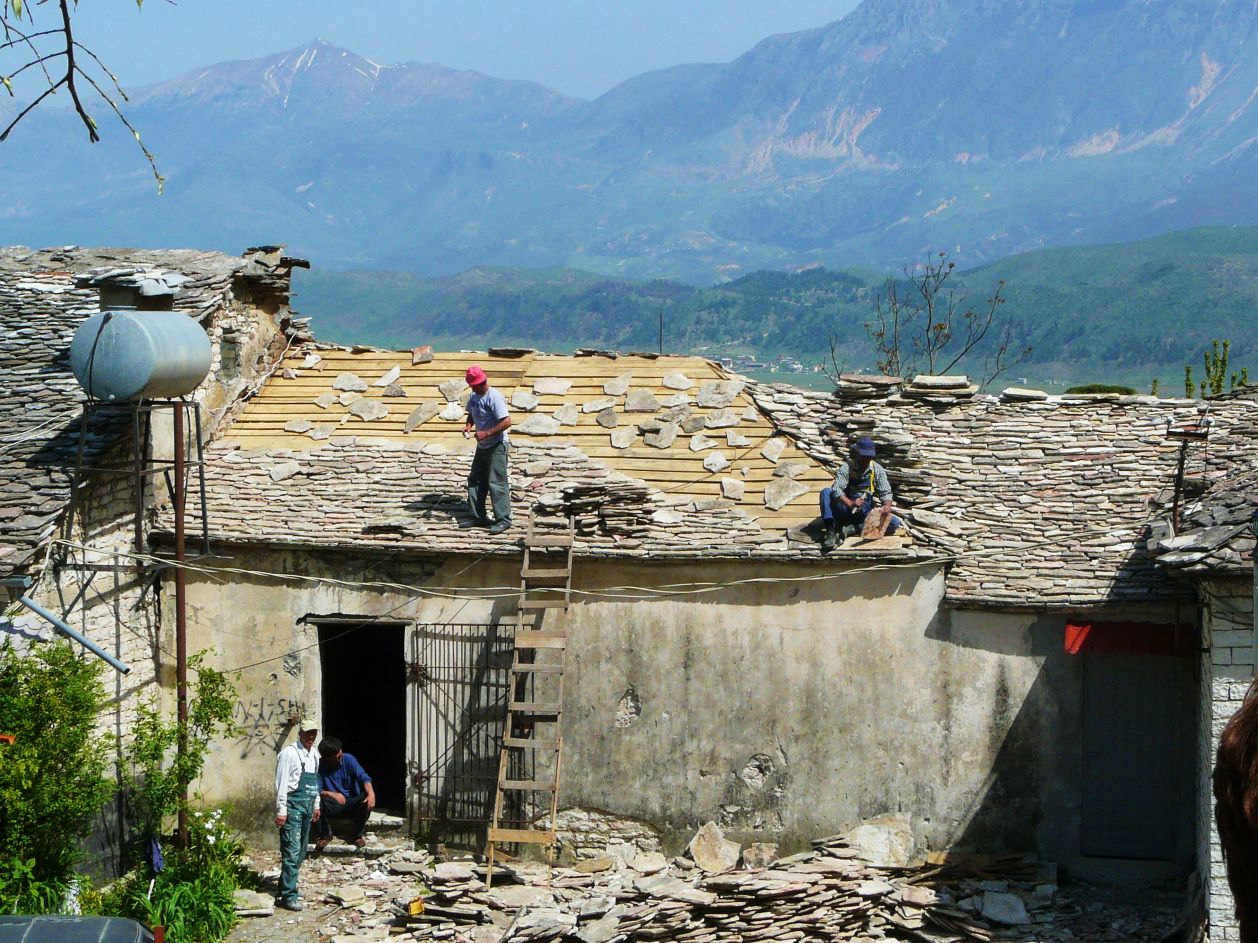 Gjirokastër